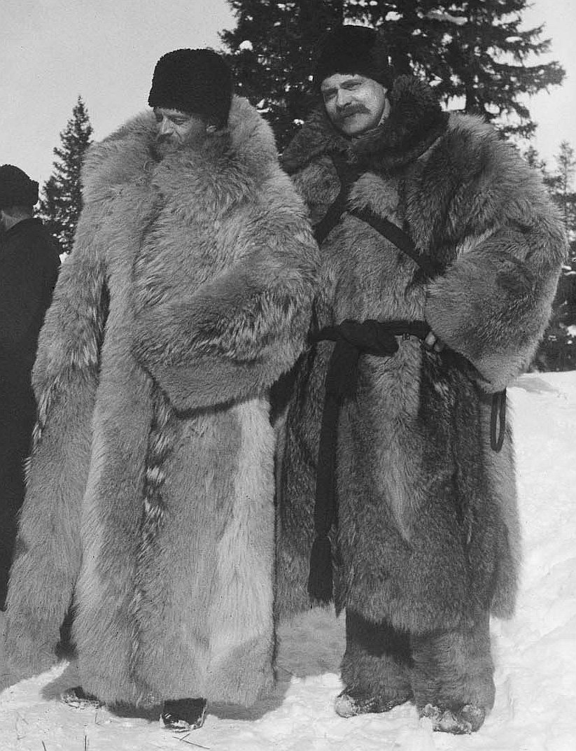 Zwei Männer mit Wolfsmänteln und Pelzmützen (Ausschnitt)